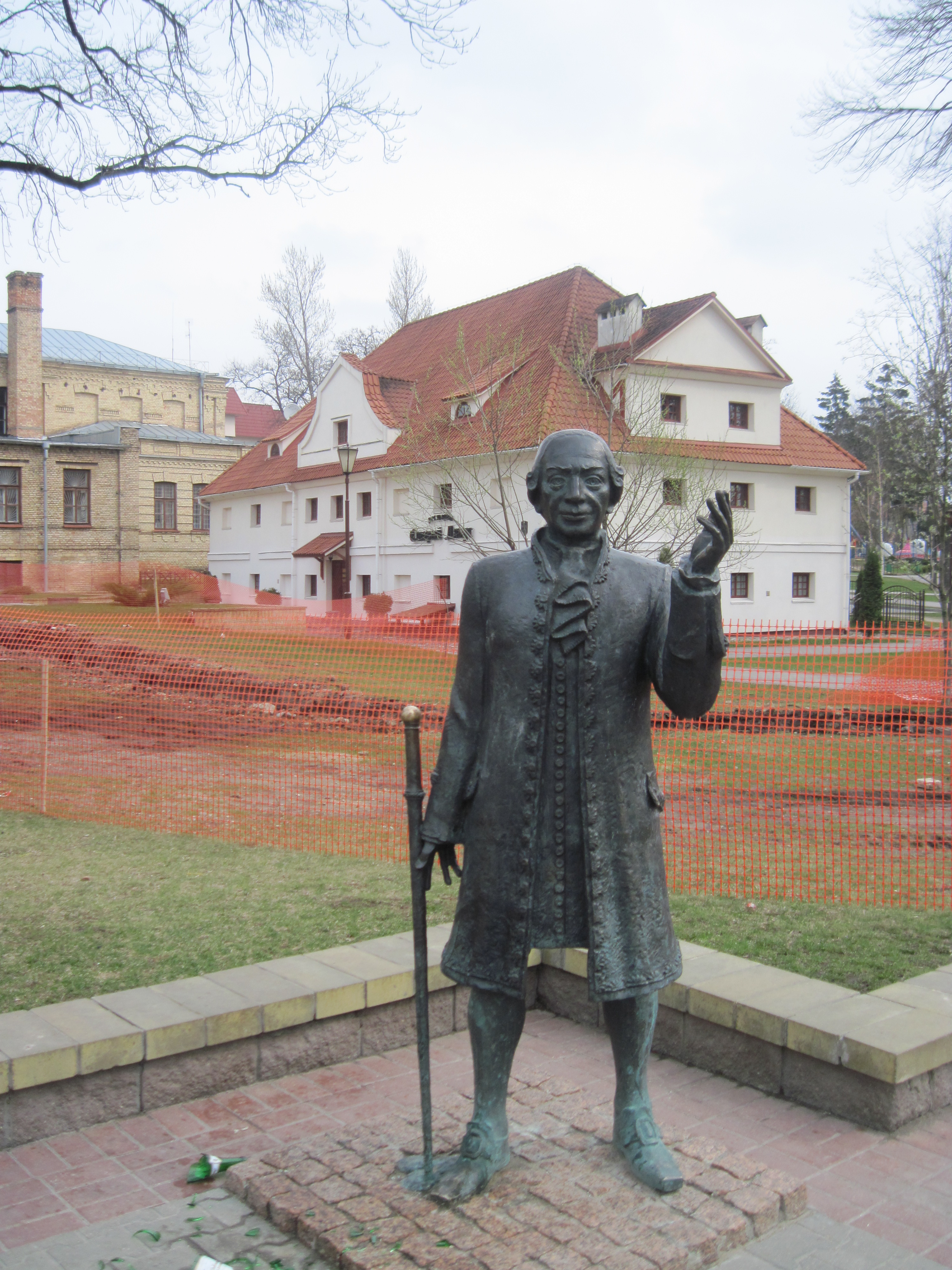 Помнік Ж.Э. Жыльберу ў Гродне, Бедарусь.